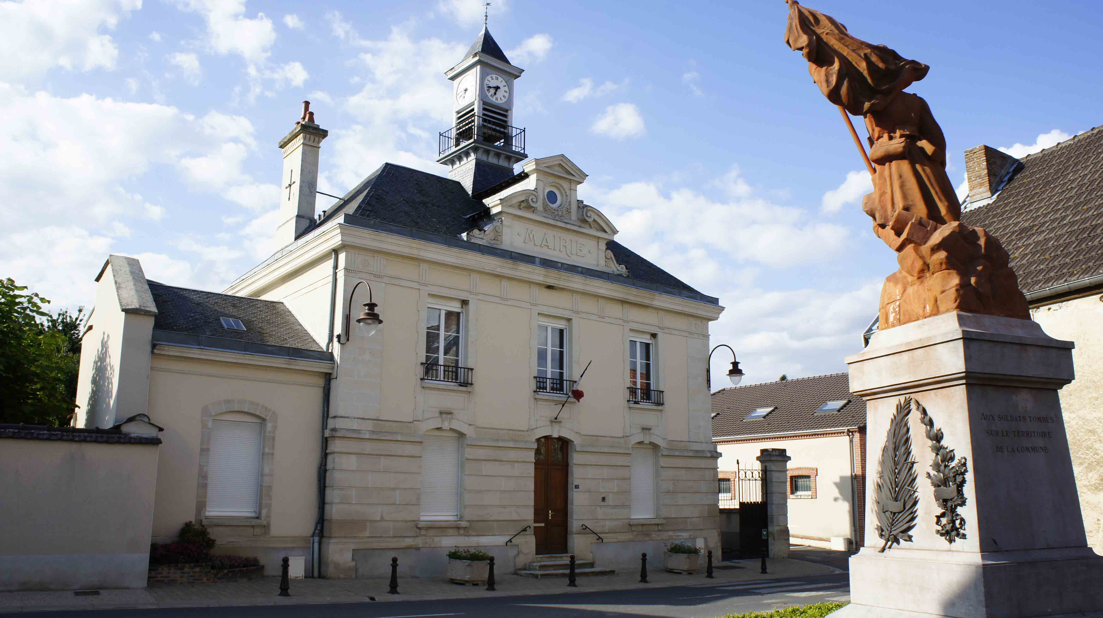 Mairie et monument aux morts d'Écueil